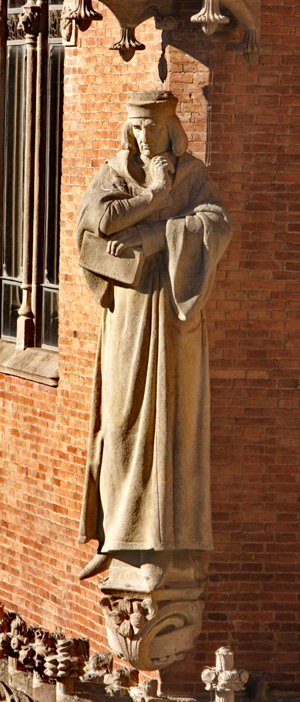 Arnau de Vilanova, obra d'Eusebi Arnau de 1905-1911, ubicada a l'hospital de Sant Pau de Barcelona.